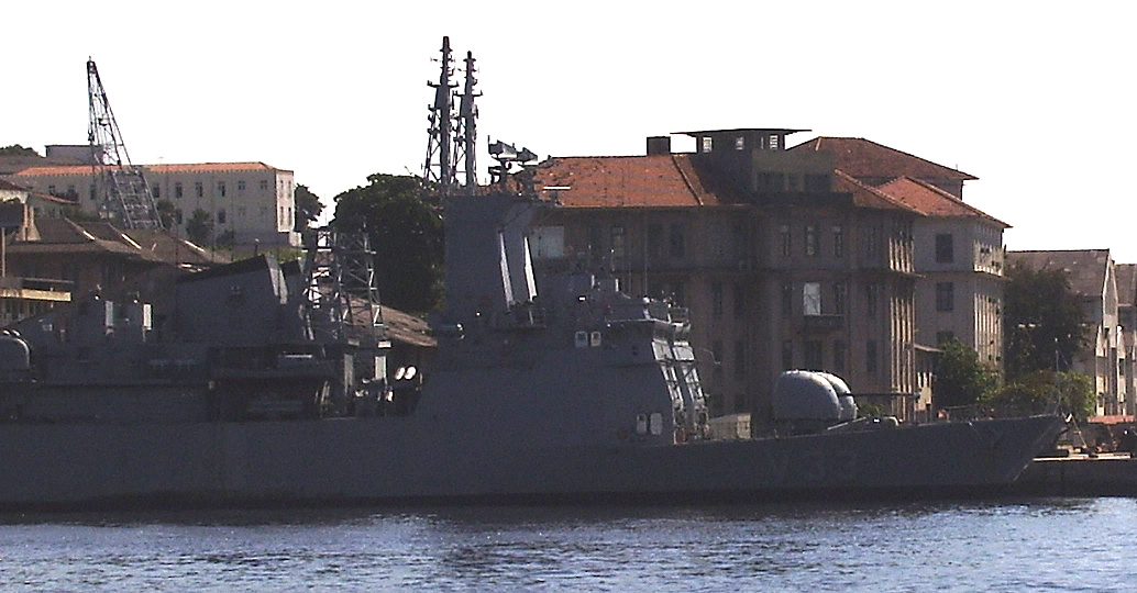 Arsenal de Marinha do Rio de Janeiro - Corveta Frontin